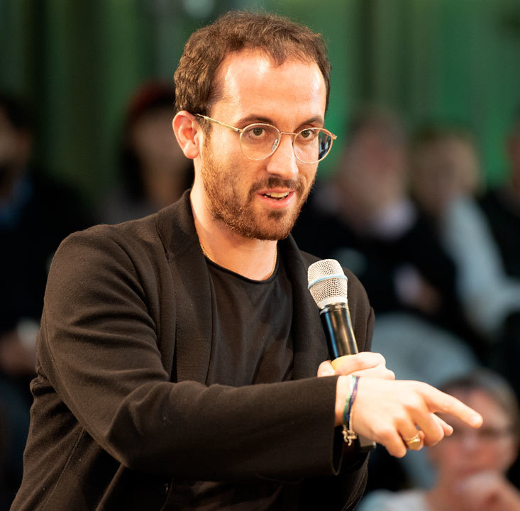 Die Grünen - Under pressure - Kunst und Freiheit: Igor Levit